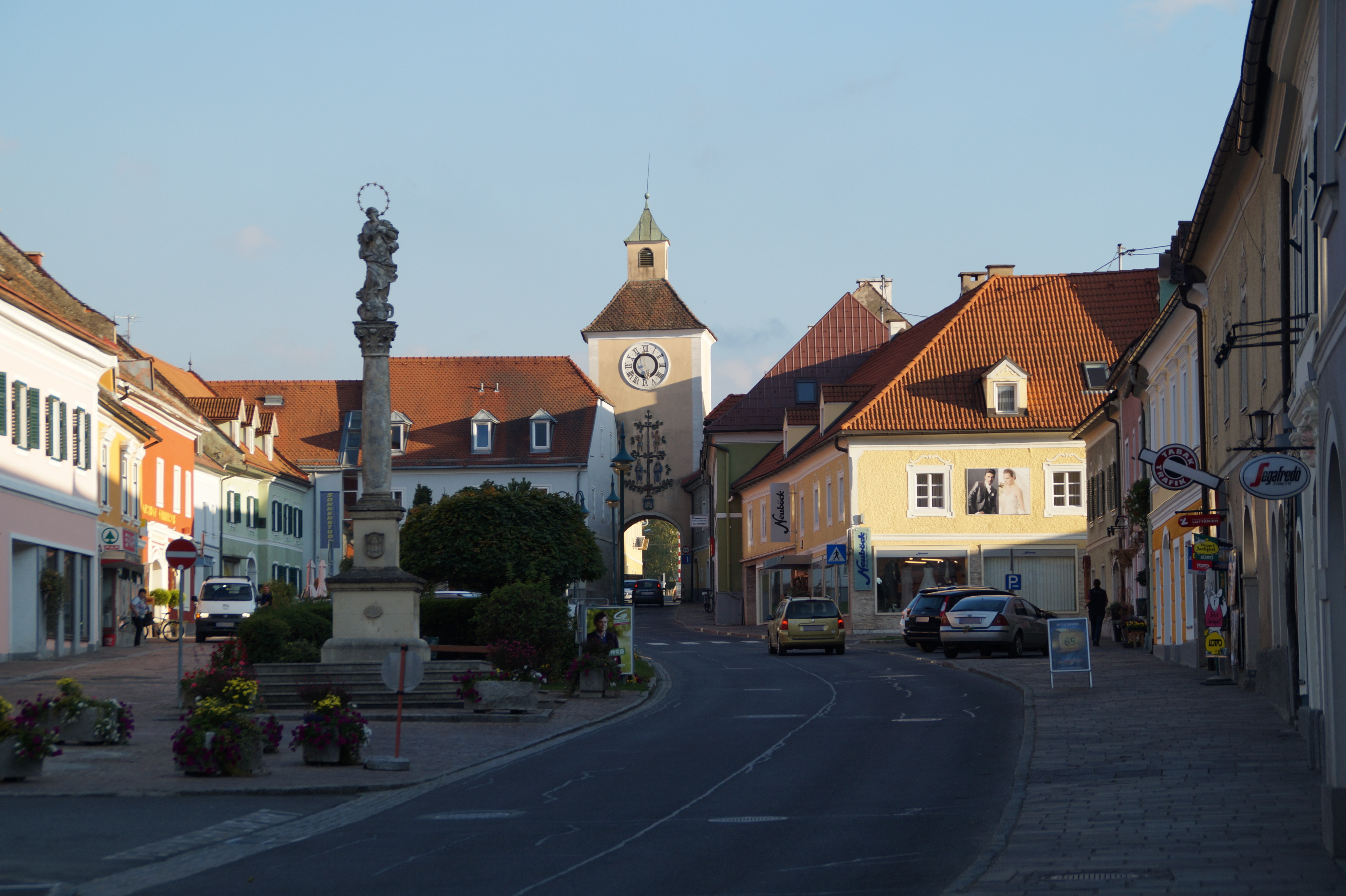 Torturm am südlichen Ende des Hauptplatzes, Obdach, Bezirk Murtal